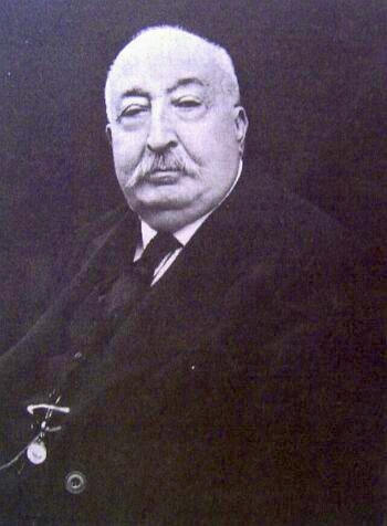 Immagine di Felice Barnabei